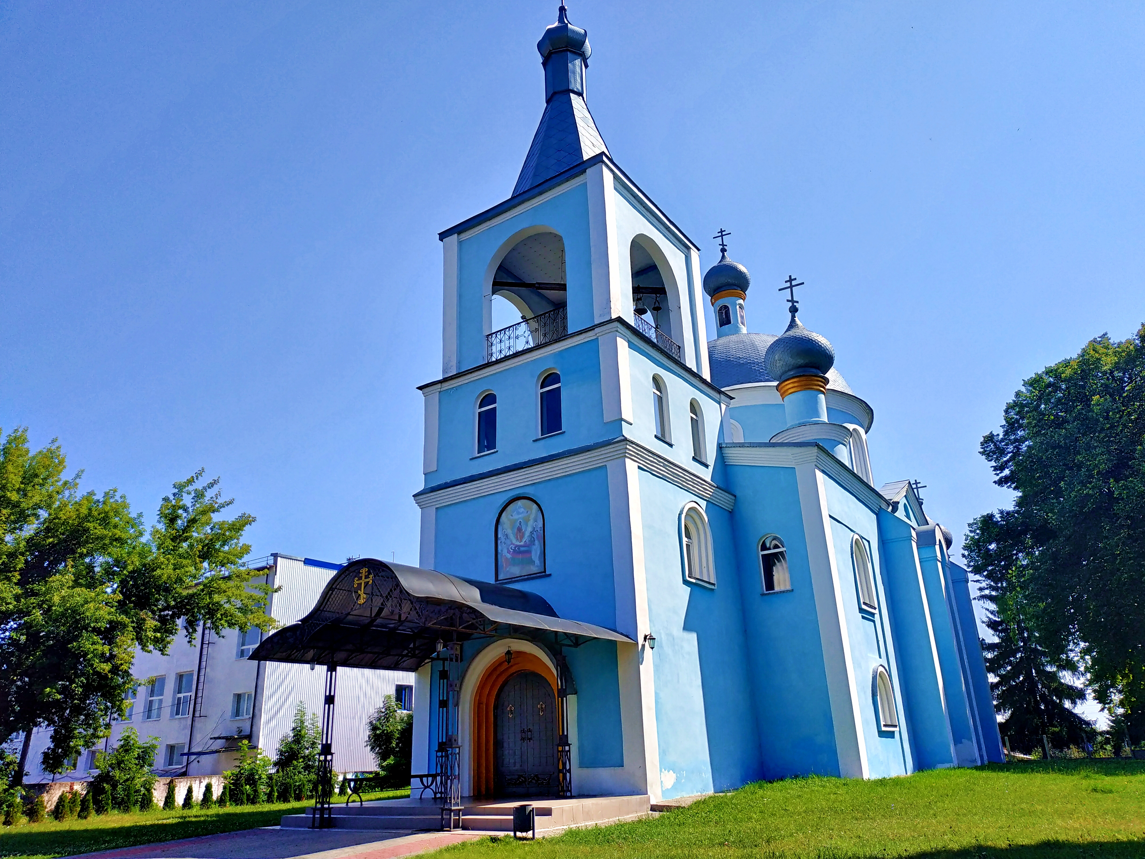 Хмельницький, Свято-Успенський храм